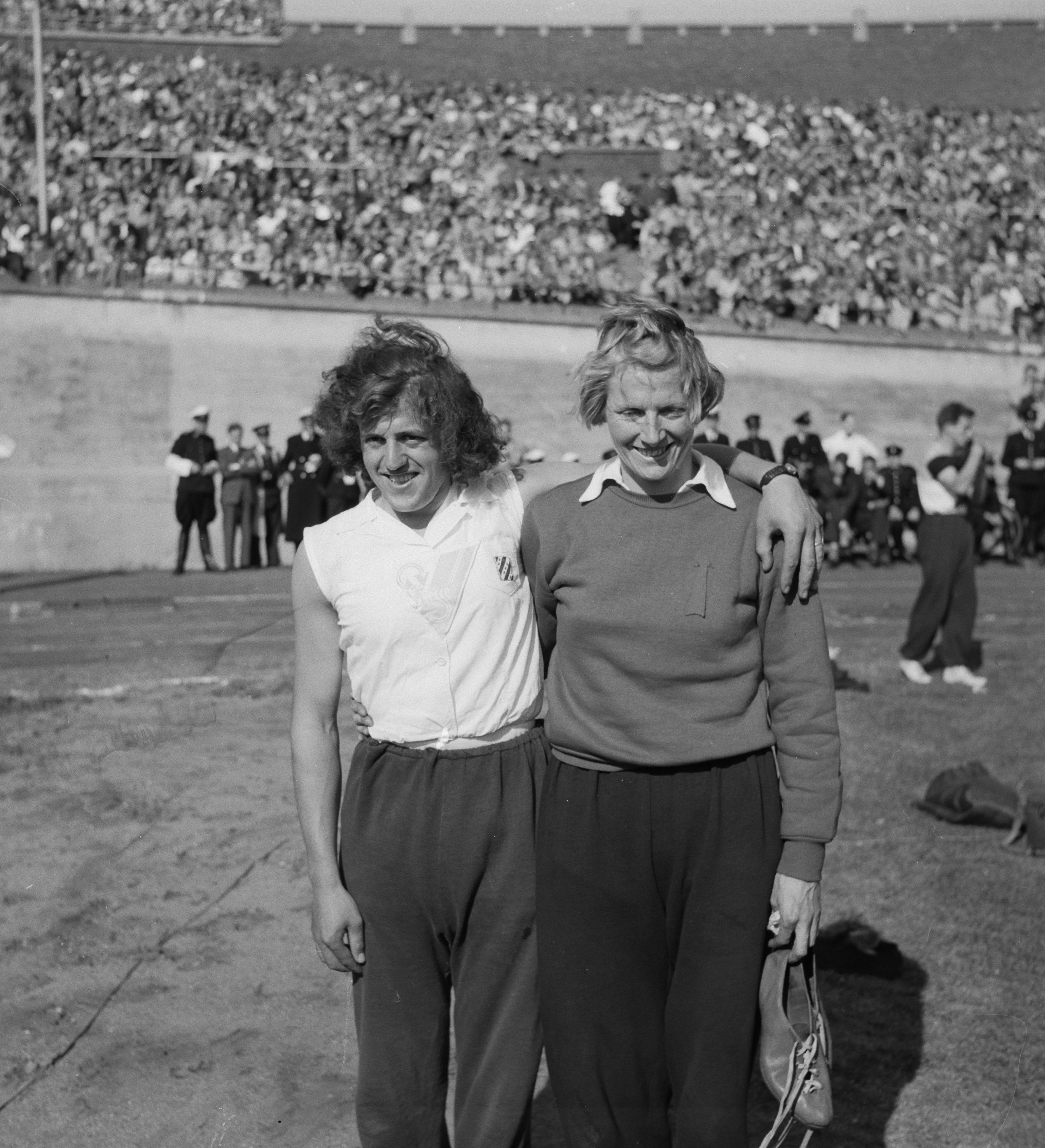 Collectie / Archief : Fotocollectie Anefo Reportage / Serie : [ onbekend ] Beschrijving : Fanny Blankers-Koen met Foekje Dillema (links) Datum : 18 juni 1950 Locatie : Amsterdam, Noord-Holland Trefwoorden : atletes, atletiek, sport Persoonsnaam : Blankers-Koen, Fanny, Dillema Foekje Fotograaf : Noske, J.D. / Anefo Auteursrechthebbende : Nationaal Archief Materiaalsoort : Negatief (zwart/wit) Nummer archiefinventaris : bekijk toegang 2.24.01.03 Bestanddeelnummer : 904-0267